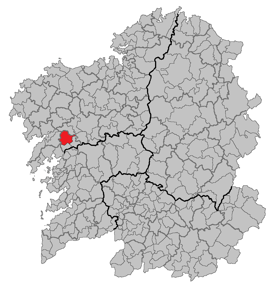 Mapa coa localización do concello de Rois.